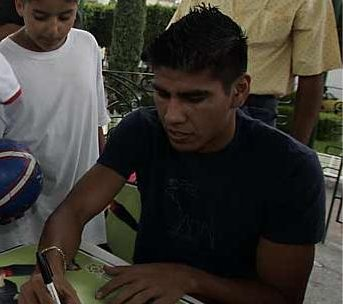 Carlos Salcido vergibt Autogramme